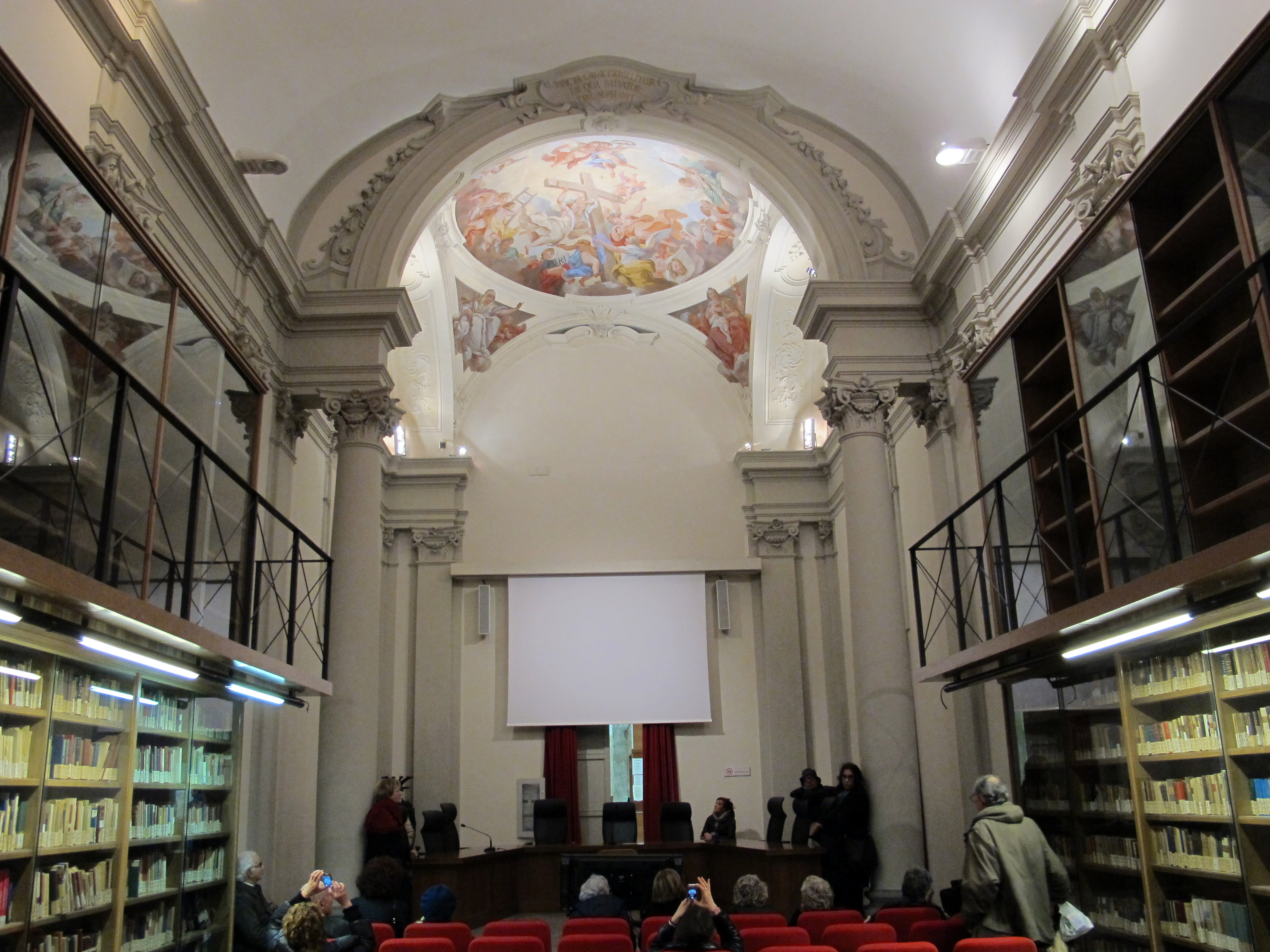 Monastero della Crocetta (oggi una sede universitaria) - Firenze